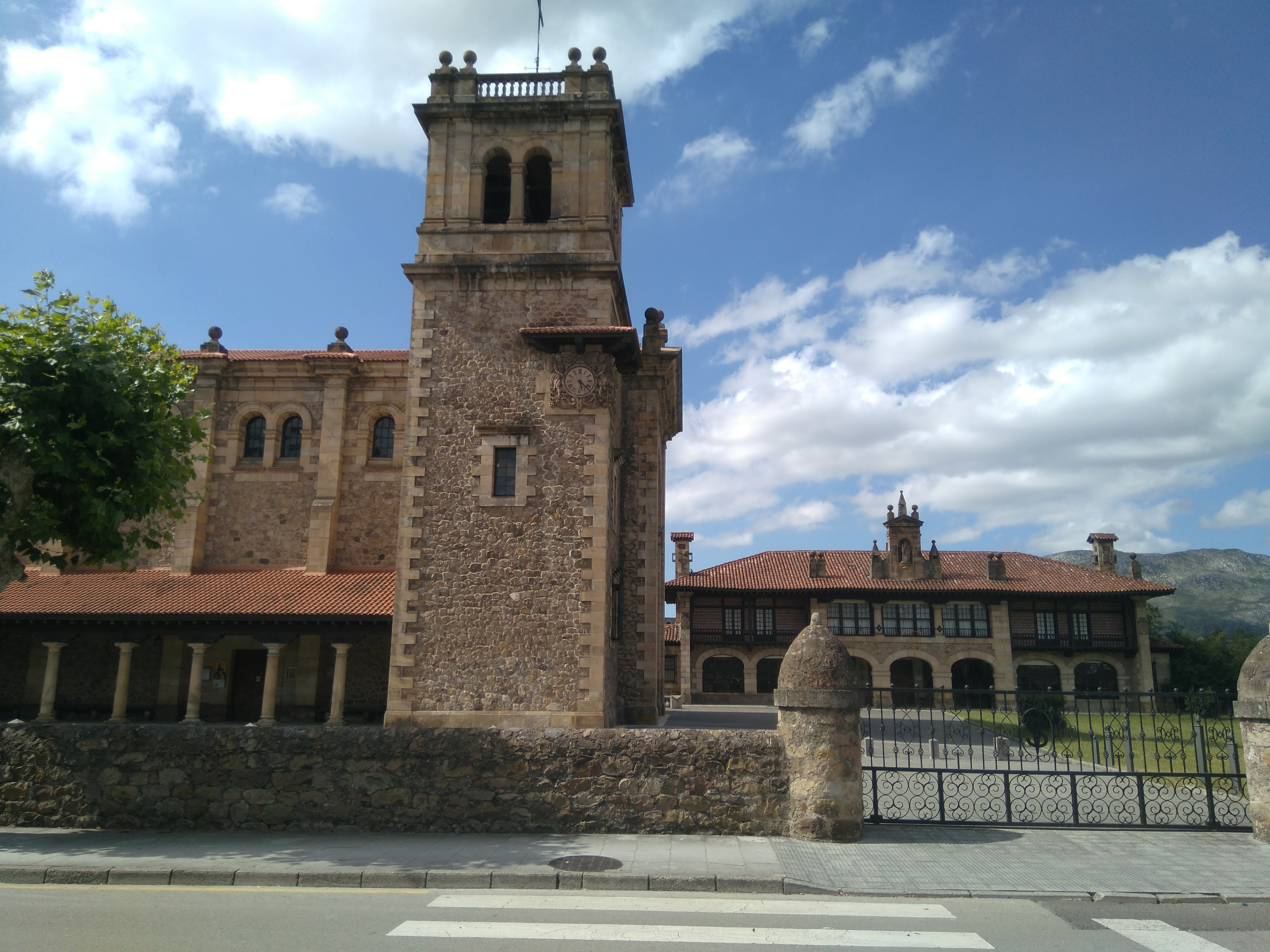 A la izquierda se puede observar la iglesia y en la derecha, al fondo el antiguo asilo de San José.